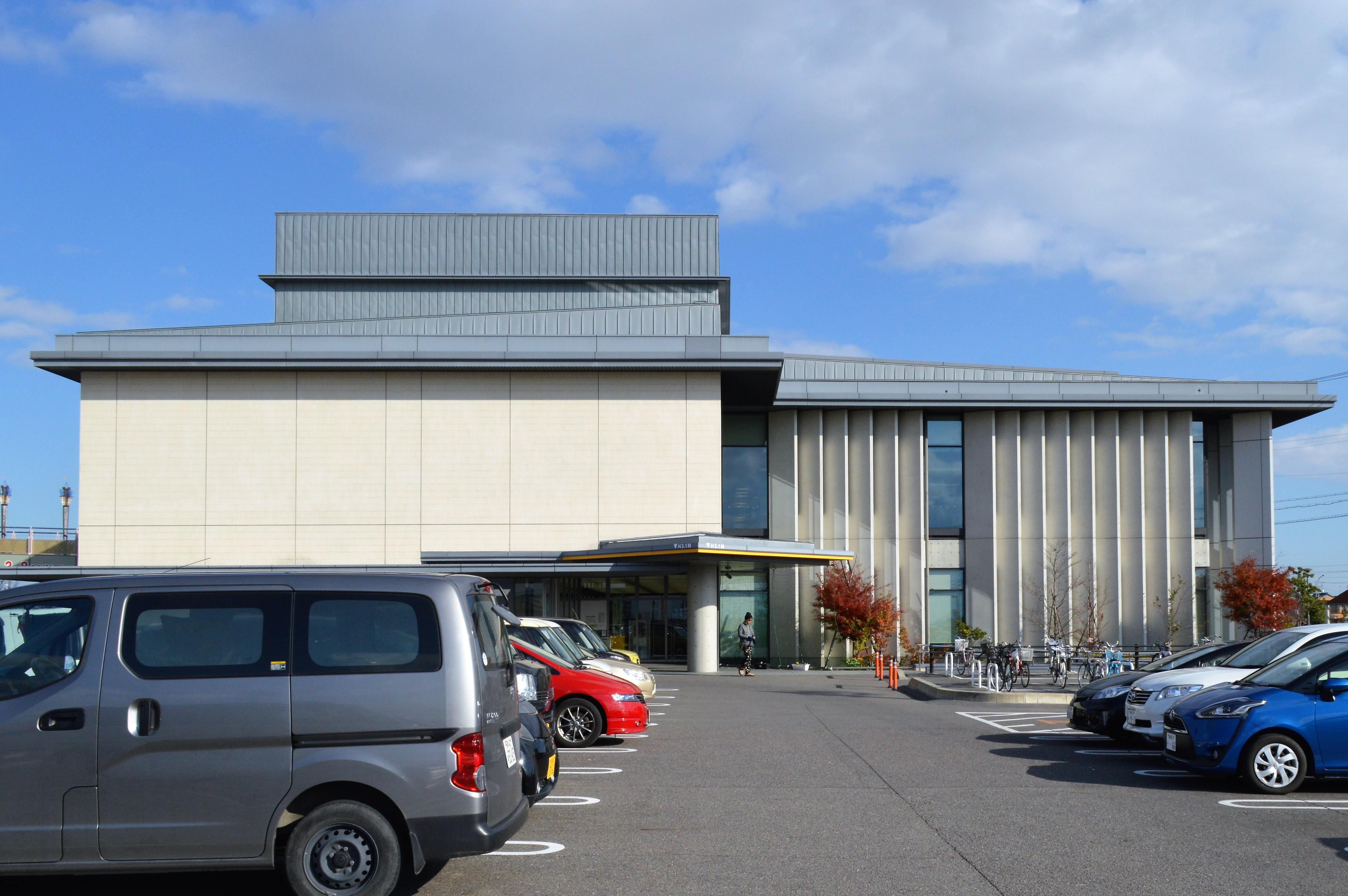 稲沢市中央図書館。